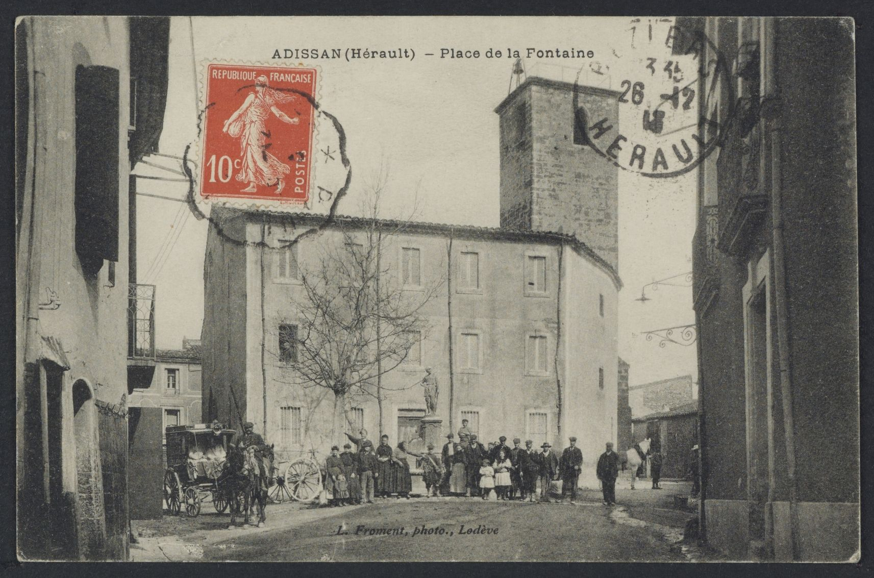 Adissan. - Place de la Fontaine : carte postale